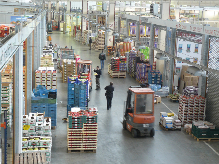 Blick in die 30.000 Quadratmeter große Obst- und Gemüsehalle des Berliner Großmarktes. Sie ist die größte überdachte Handelsfläche auf dem Gelände an der Beusselstraße wird vom Fruchthof Berlin. Quelle: BGM